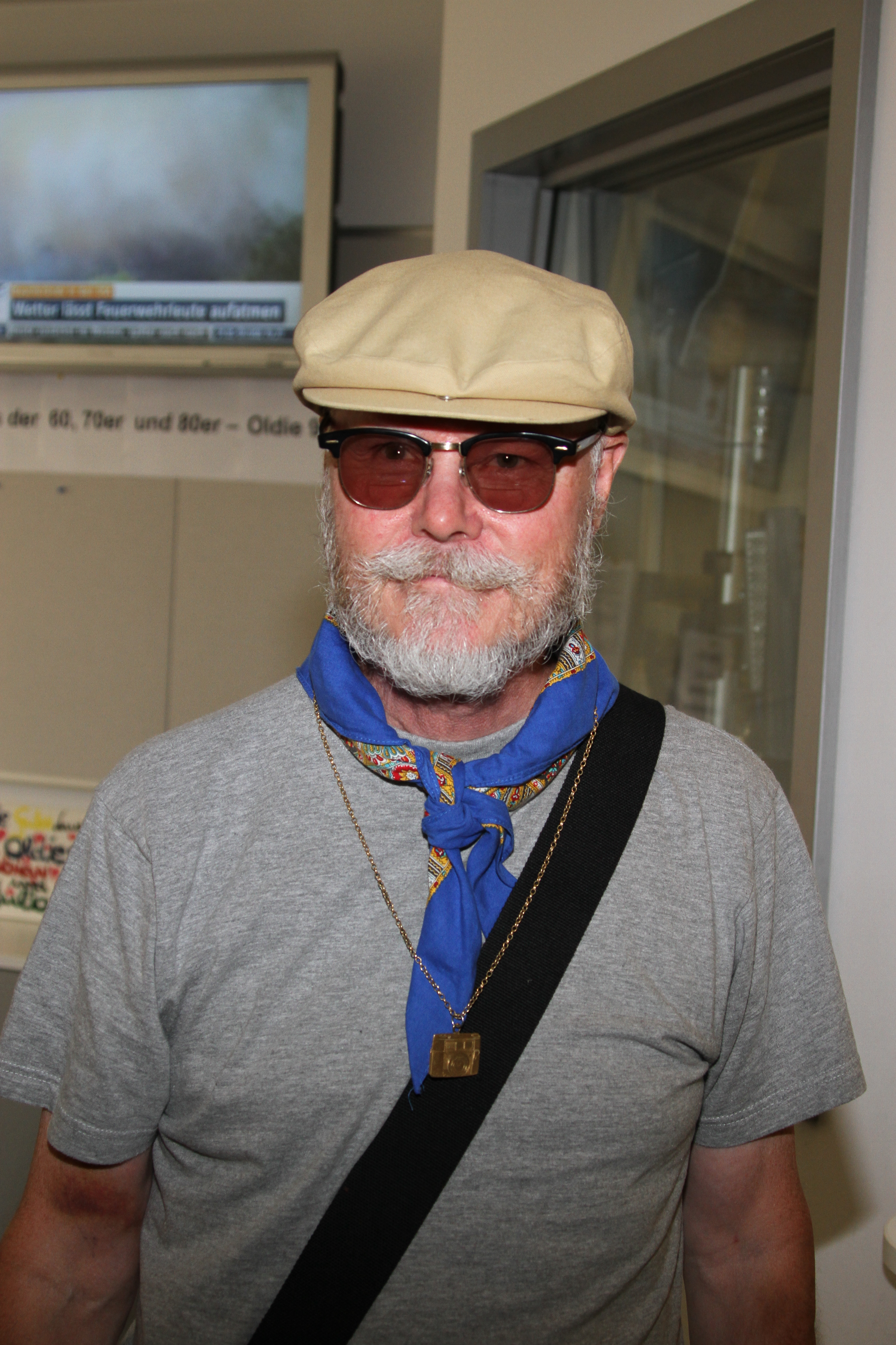 Jan Harpo Torsten Svensson, Künstlername Harpo, (* 5. April 1950 in Bandhagen, heute im Stockholmer Stadtteil Vantör) ist ein schwedischer Popsänger.